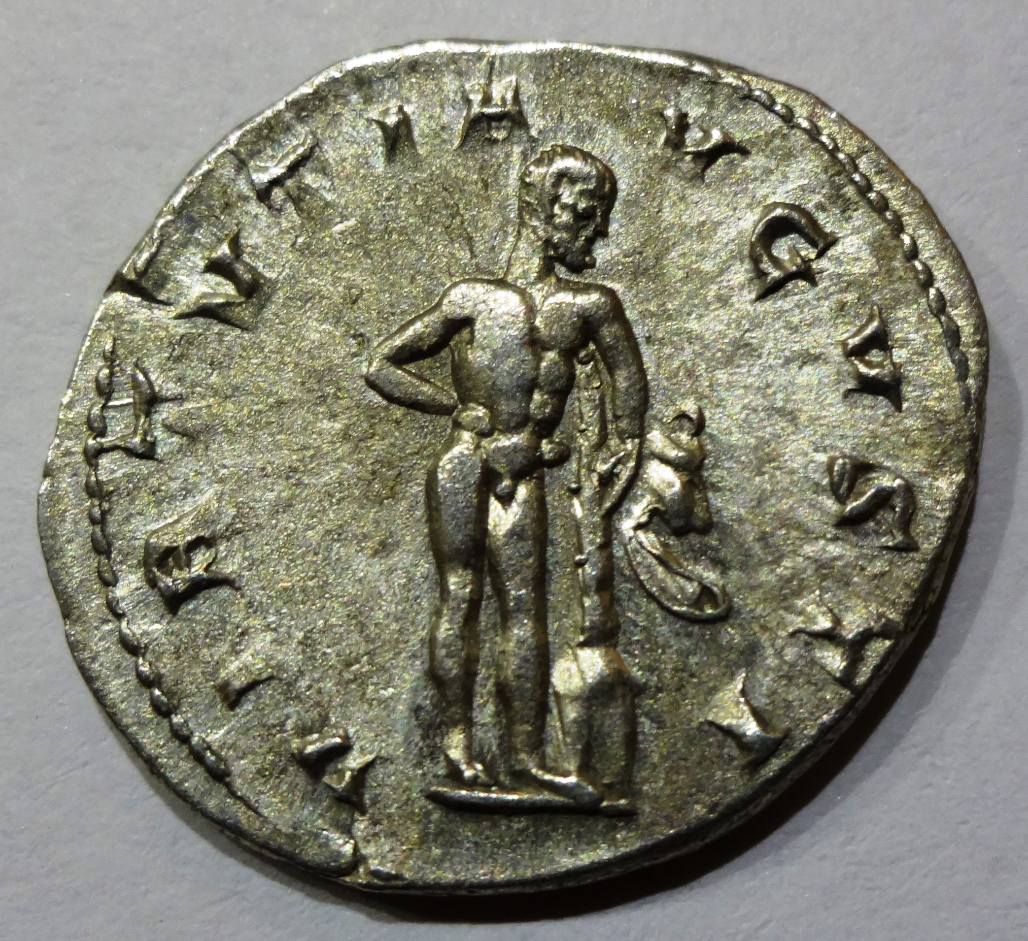 Hercules auf Münze Gordianus' III., Kampmann 72.56